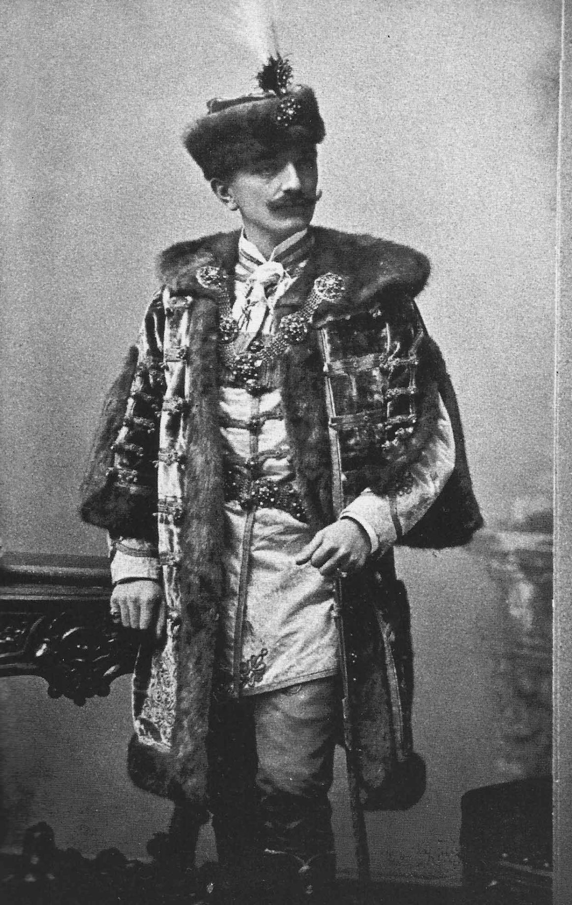 Gyorgy Bernady (1864-1938), homme politique hongrois de Transylvanie, en tenu de magnat hongrois.